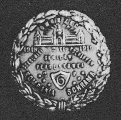 Odznaka Schramma